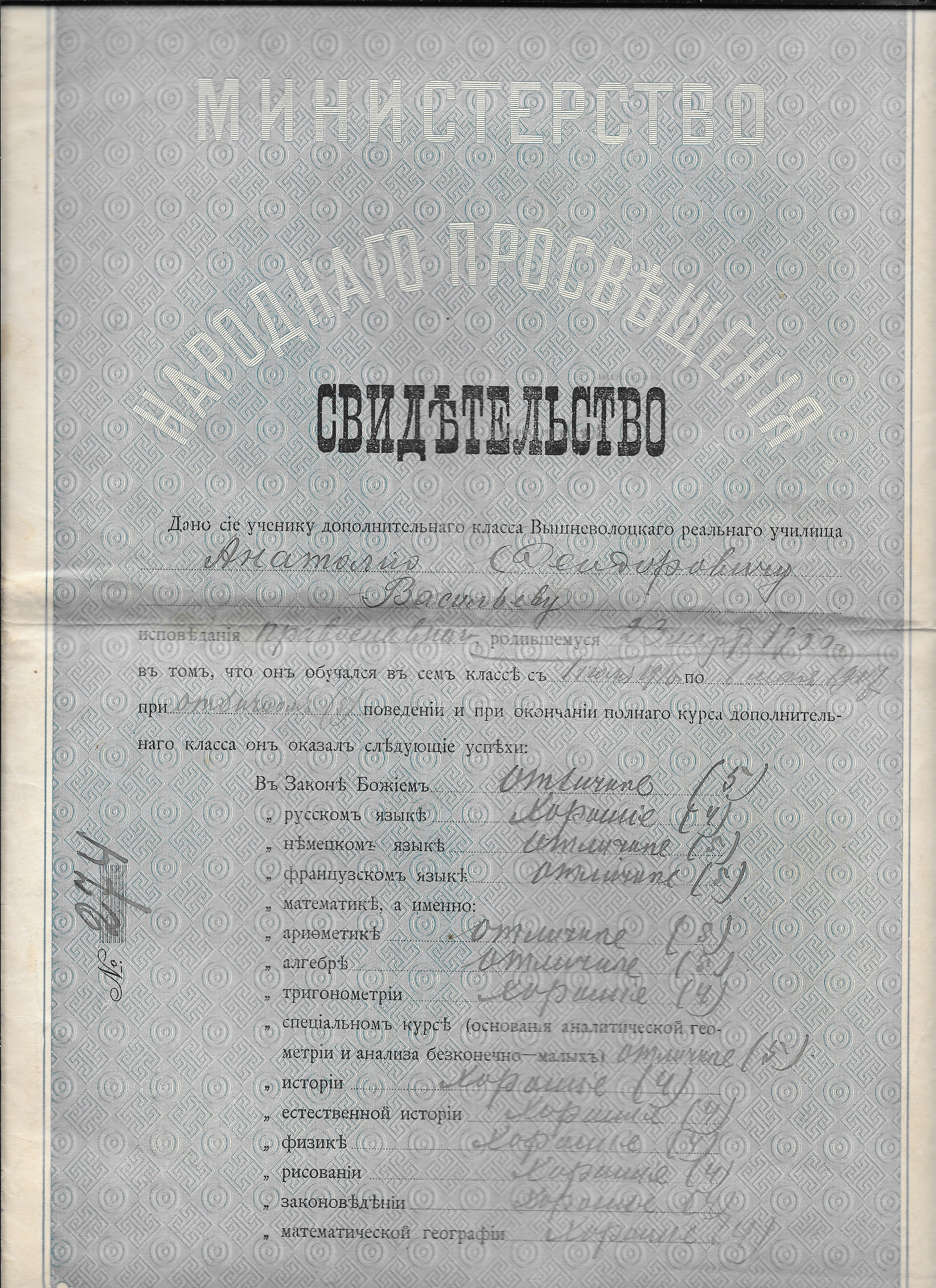 Свидетельство об окончании Вышневолоцкого реального училища Васильева А. Ф.